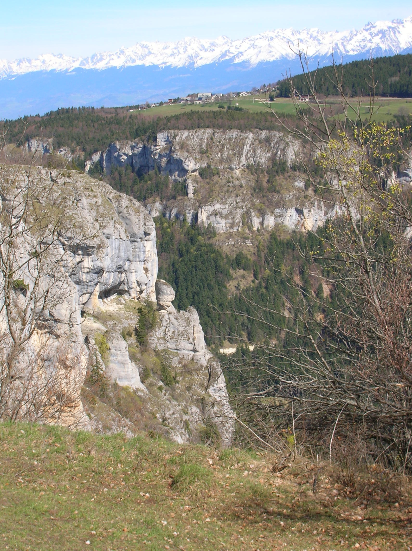 gorges du furon et st nizier du moucherotte, Isère, France.